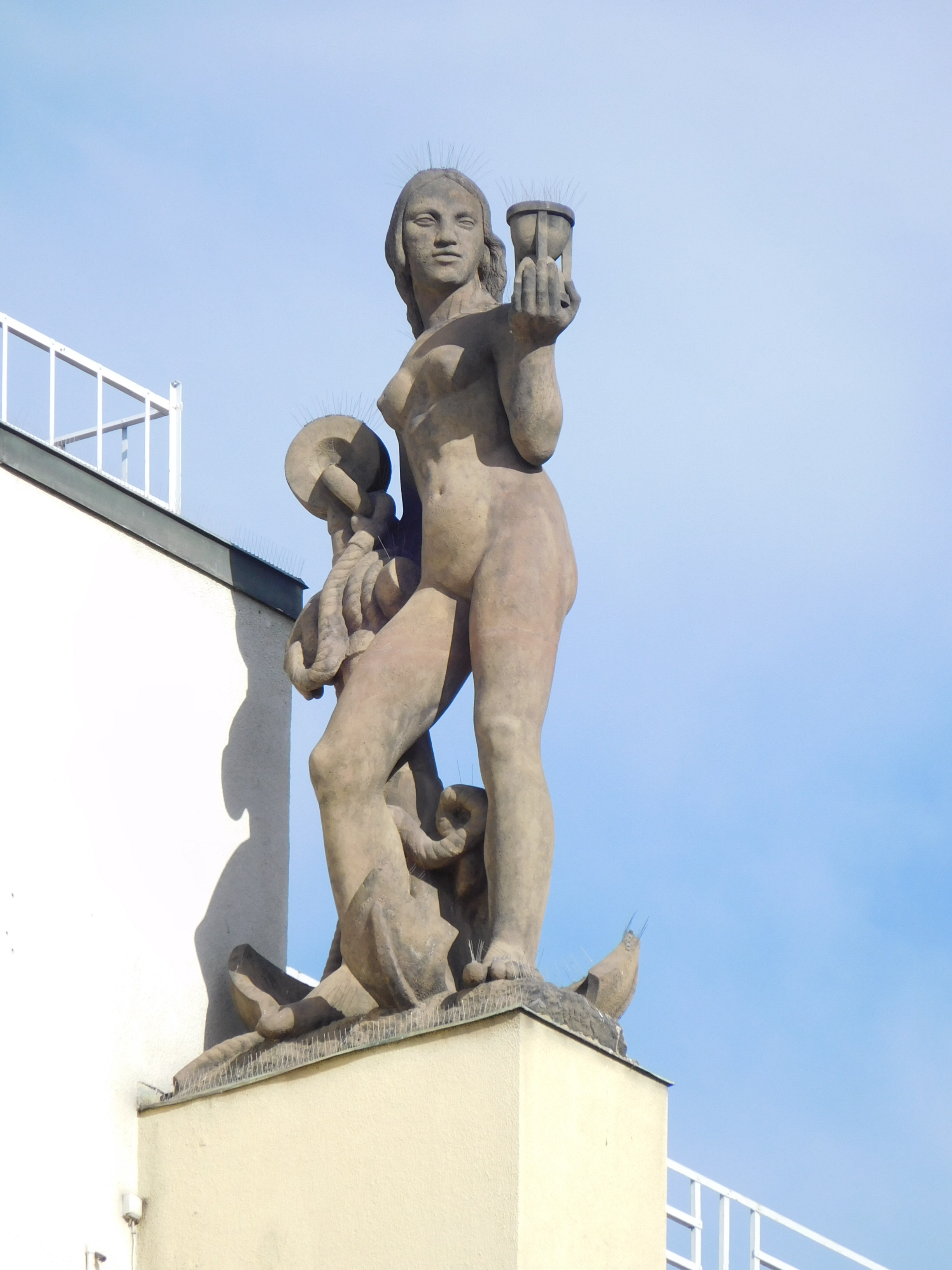 Praha - Staré Město, Revoluční 1, Palác Kotva - socha